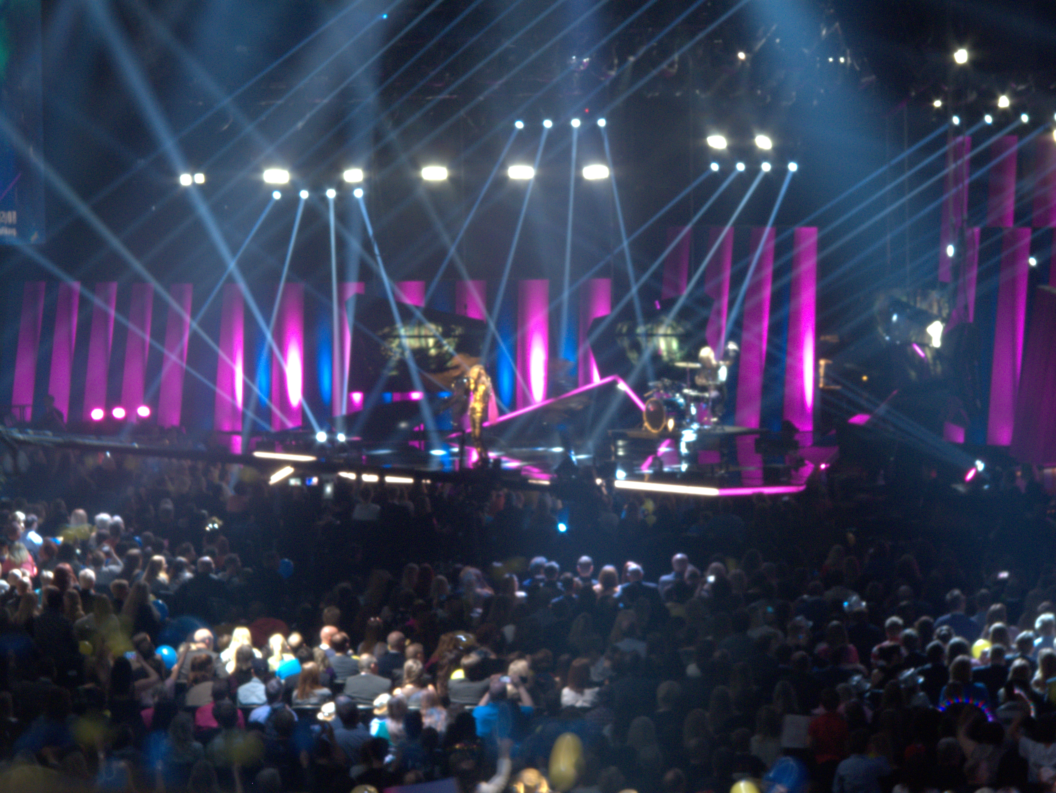 Melodifestivalen 2014 Friends Arena